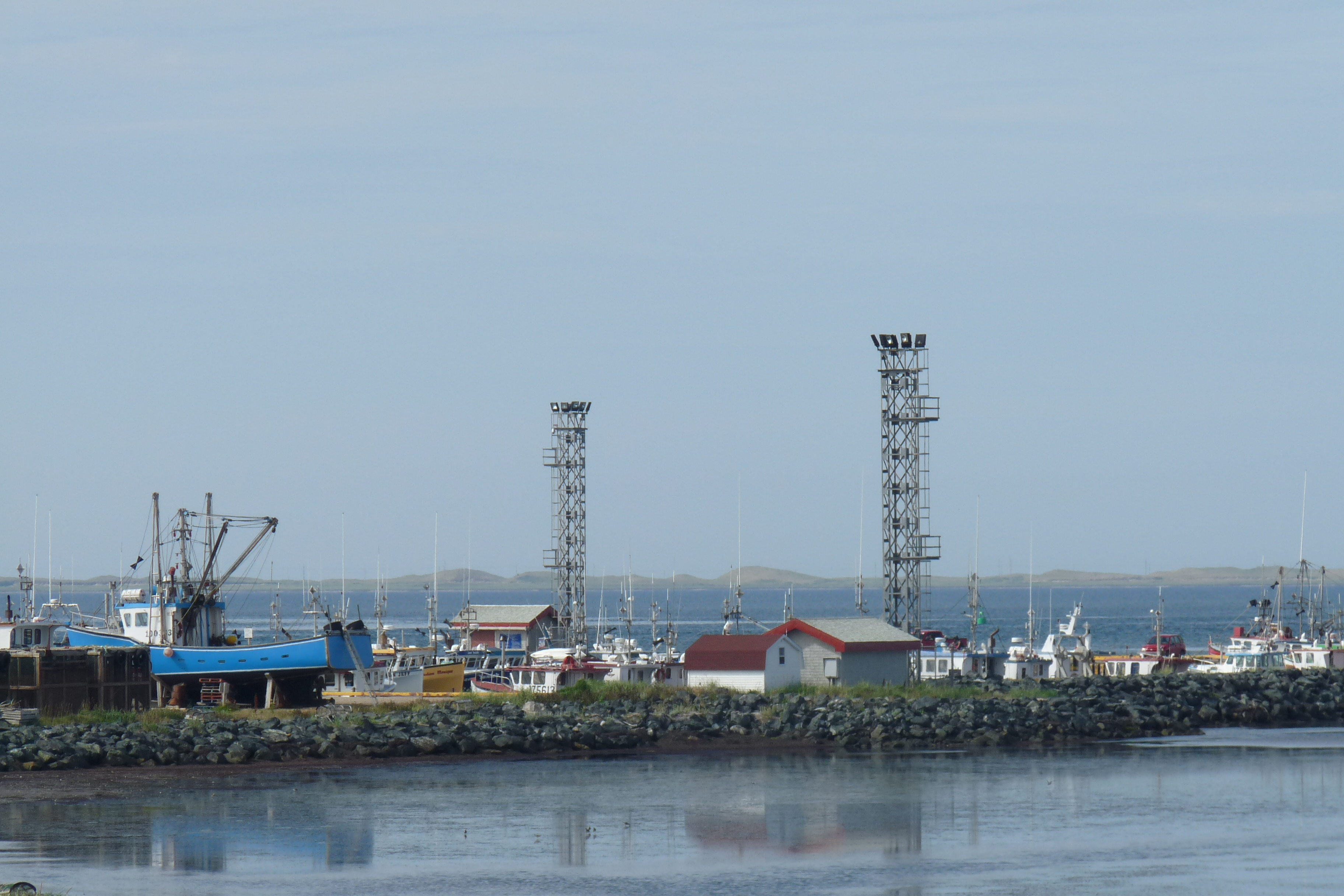 Quai de Grande Entrée et bateaux de pêche